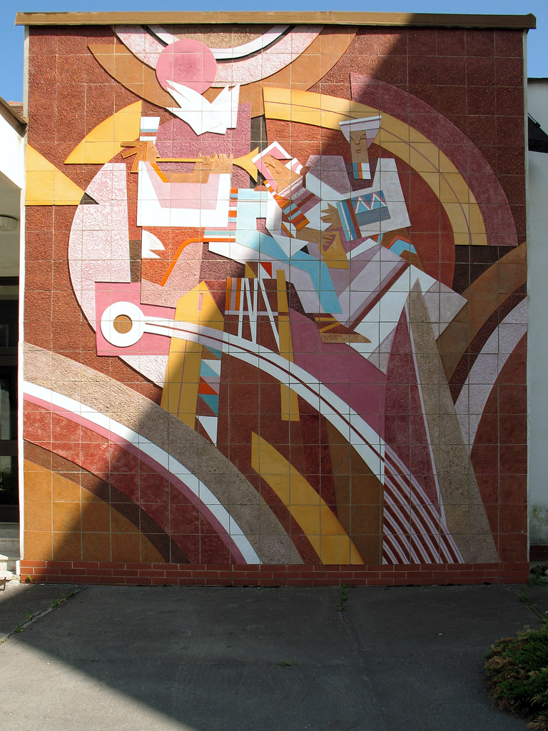 Keramická mozaika